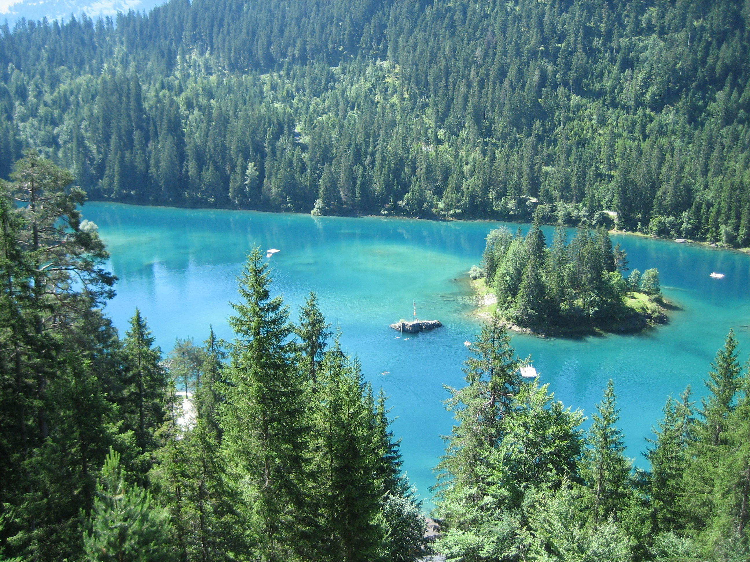 Caumasee im Juli 2008 bei hohem Wasserstand